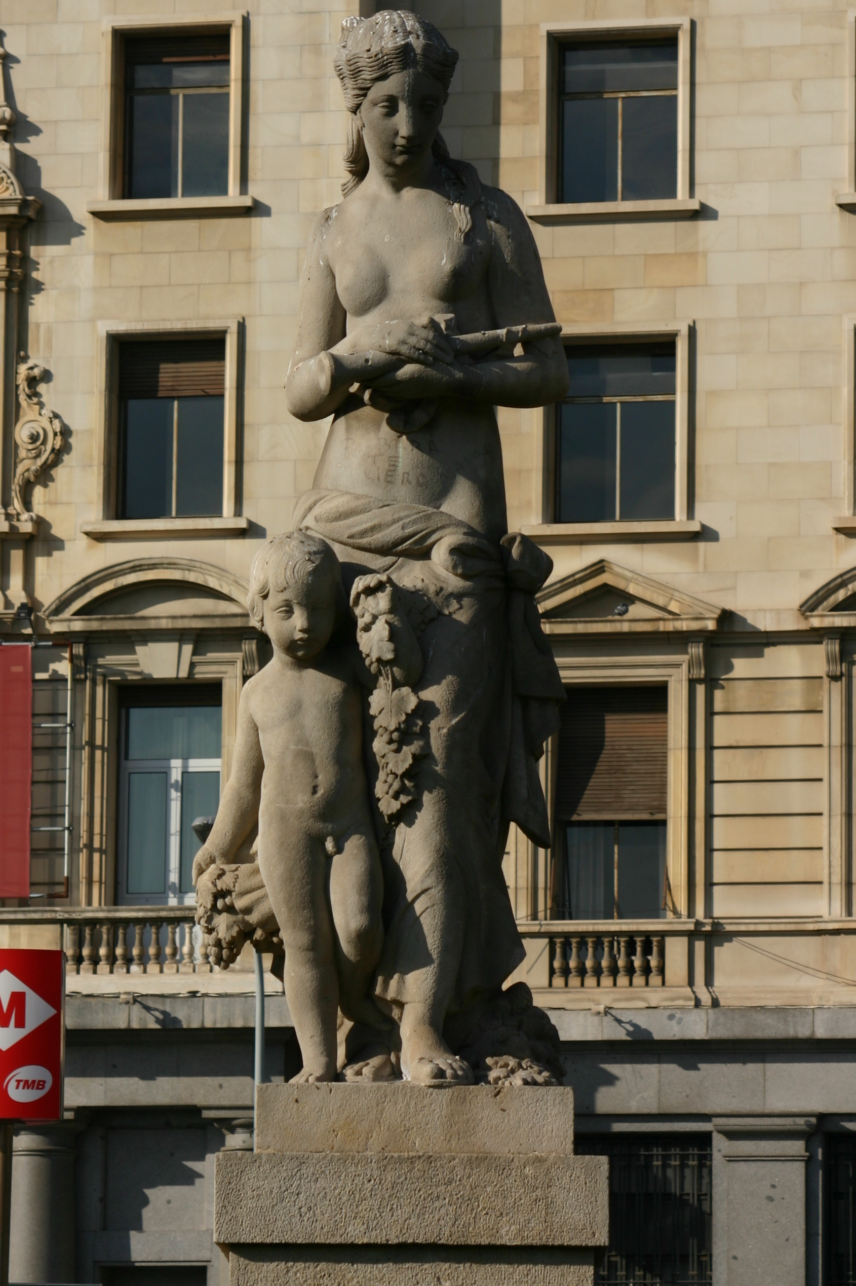 Dona amb nen i flabiol. Plaza Catalunya. Barcelona (Spain)